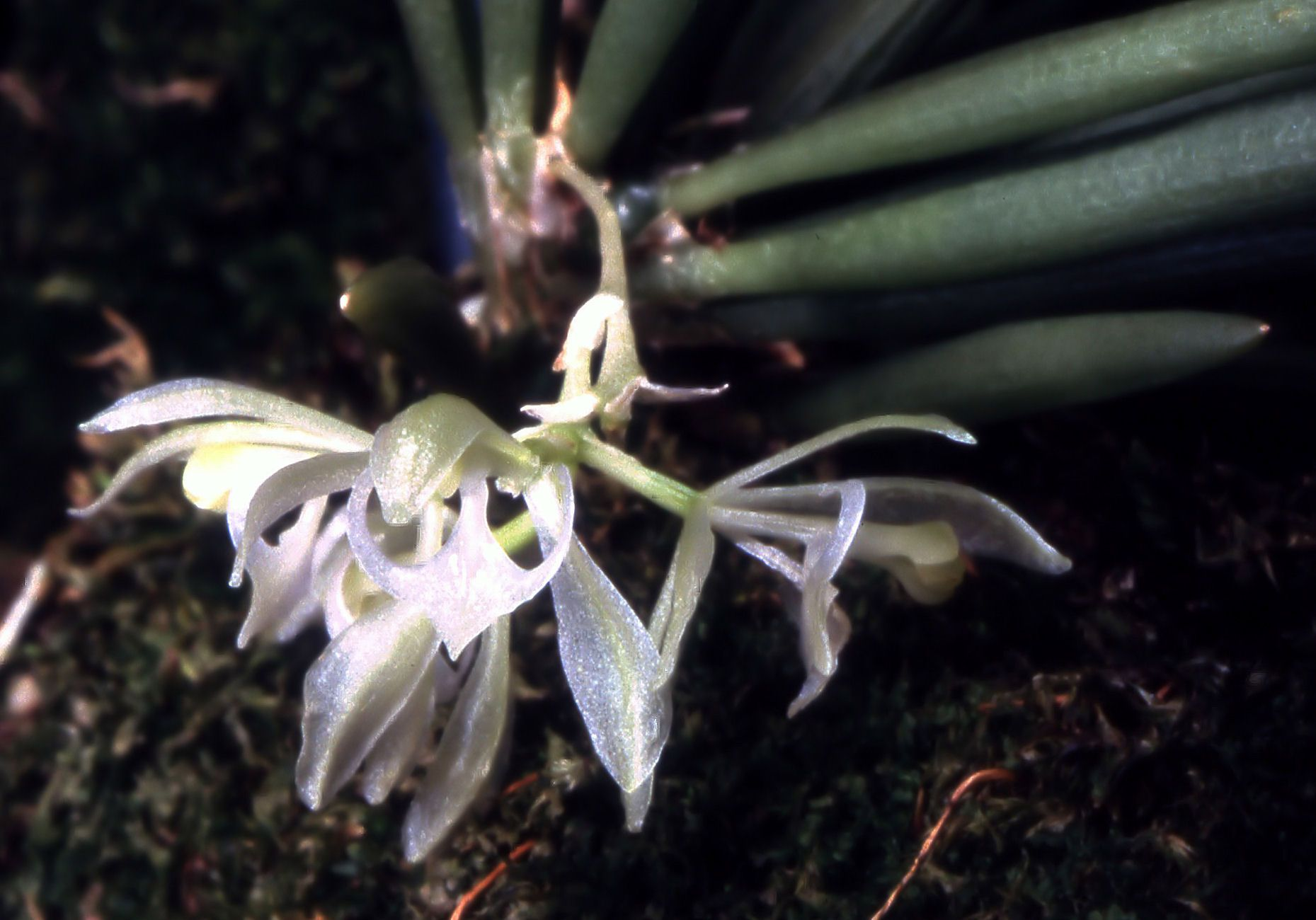 Seegeriella pinifolia